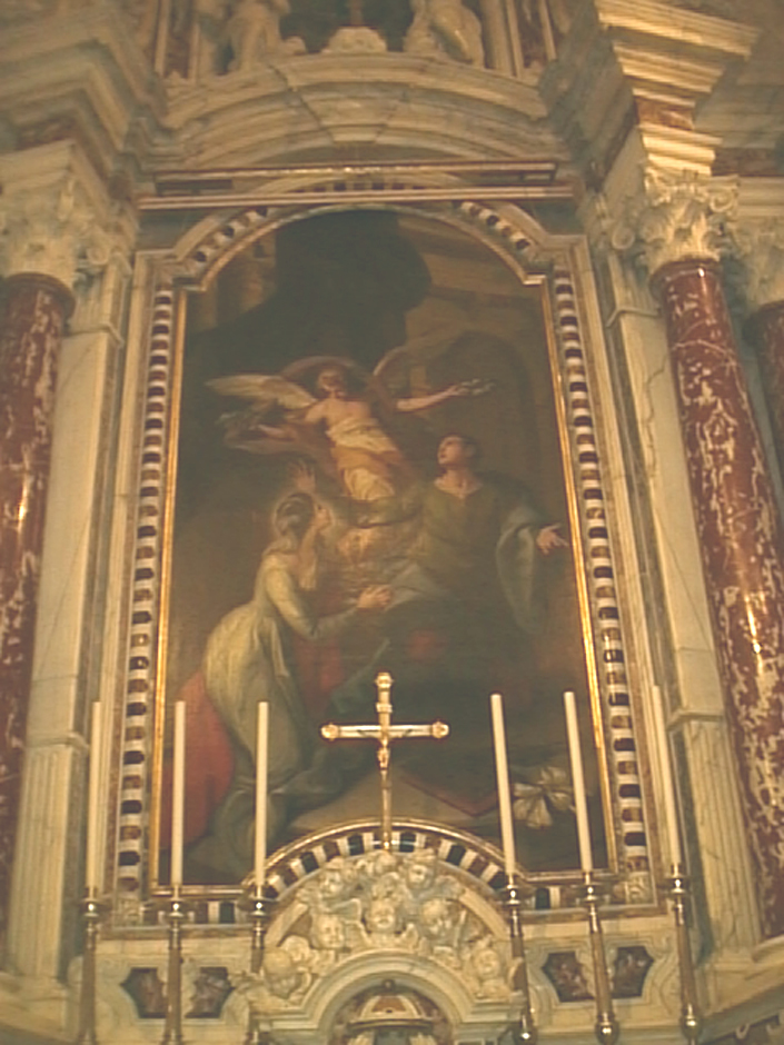 Nozze mistiche di Santa Cecilia e San Valeriano, Pietro Angeletti (XVIII secolo) - Cattedrale di Cagliari